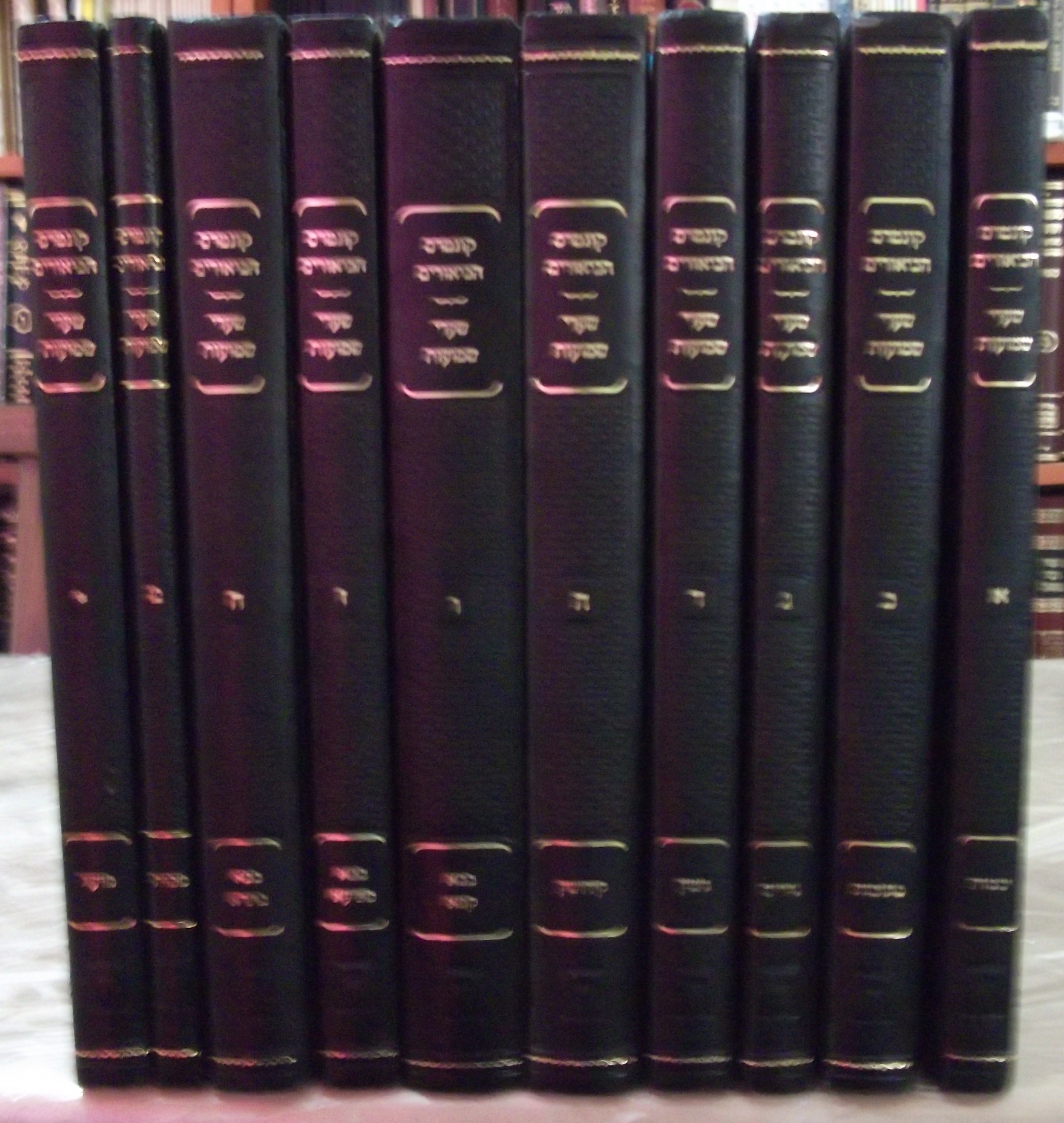 ספר קונטרס הביאורים של הגרמ"ש שפירא